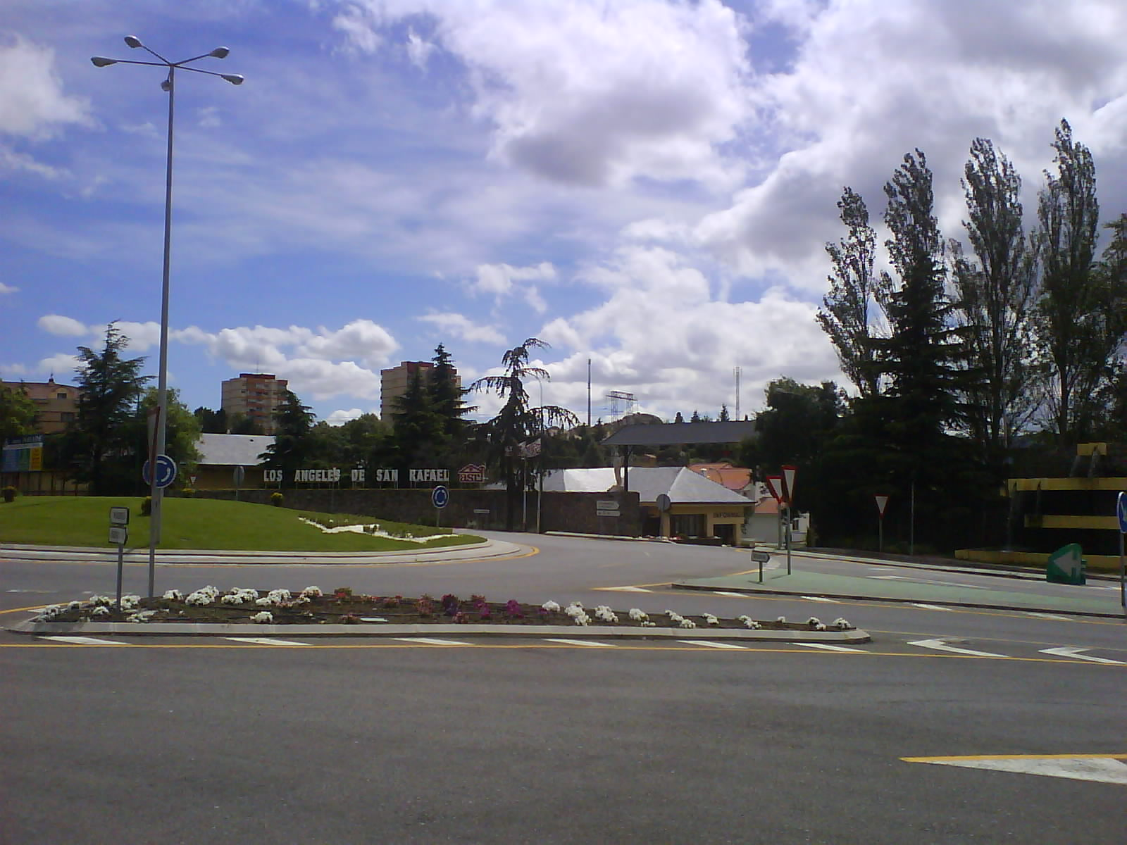 El Espinar, Segovia España. Los Angeles de San Rafael.